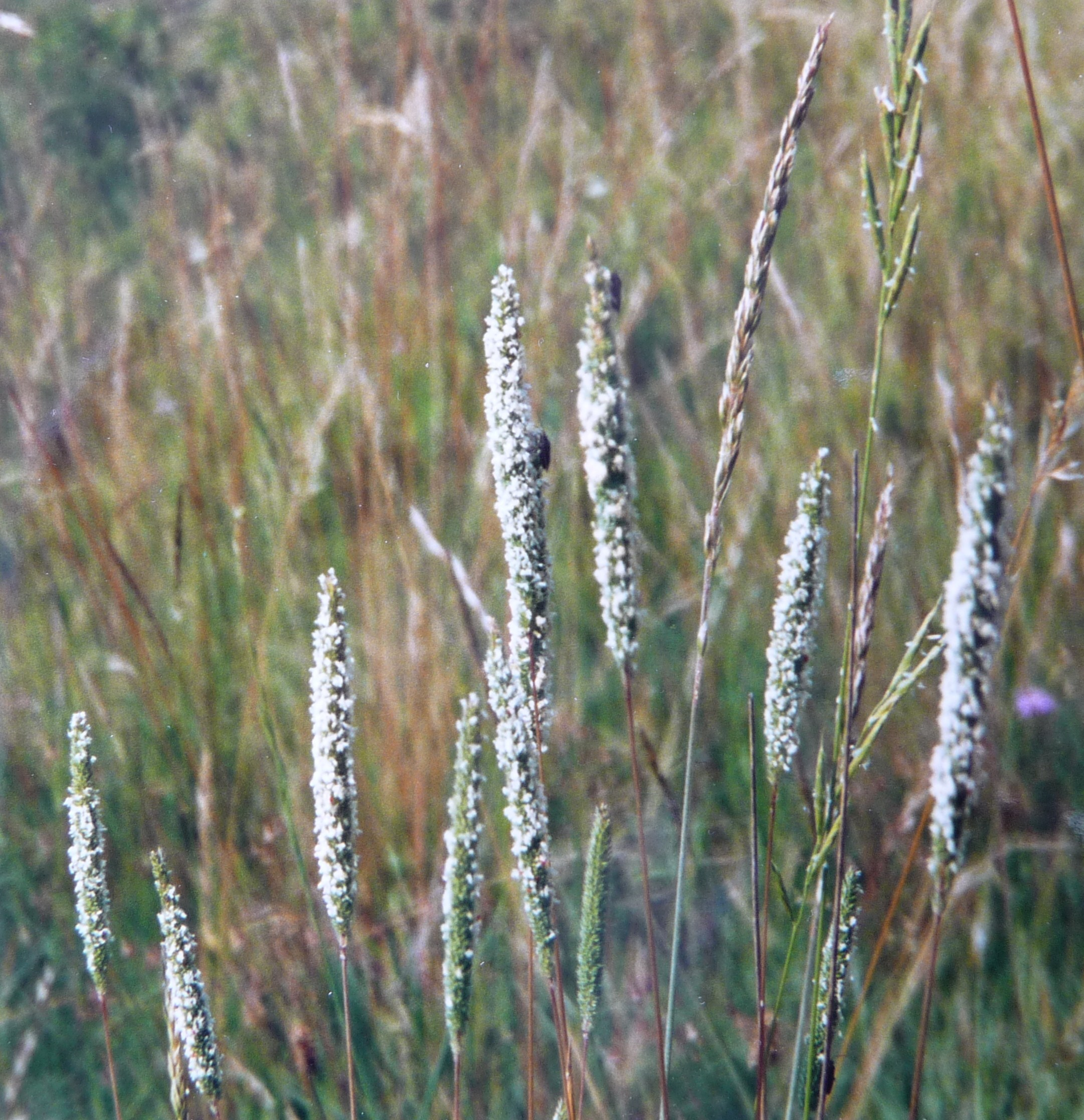 Das Glanz- oder Steppenlieschgras (Phleum phleoides) bei Kallmünz, Oberpfalz